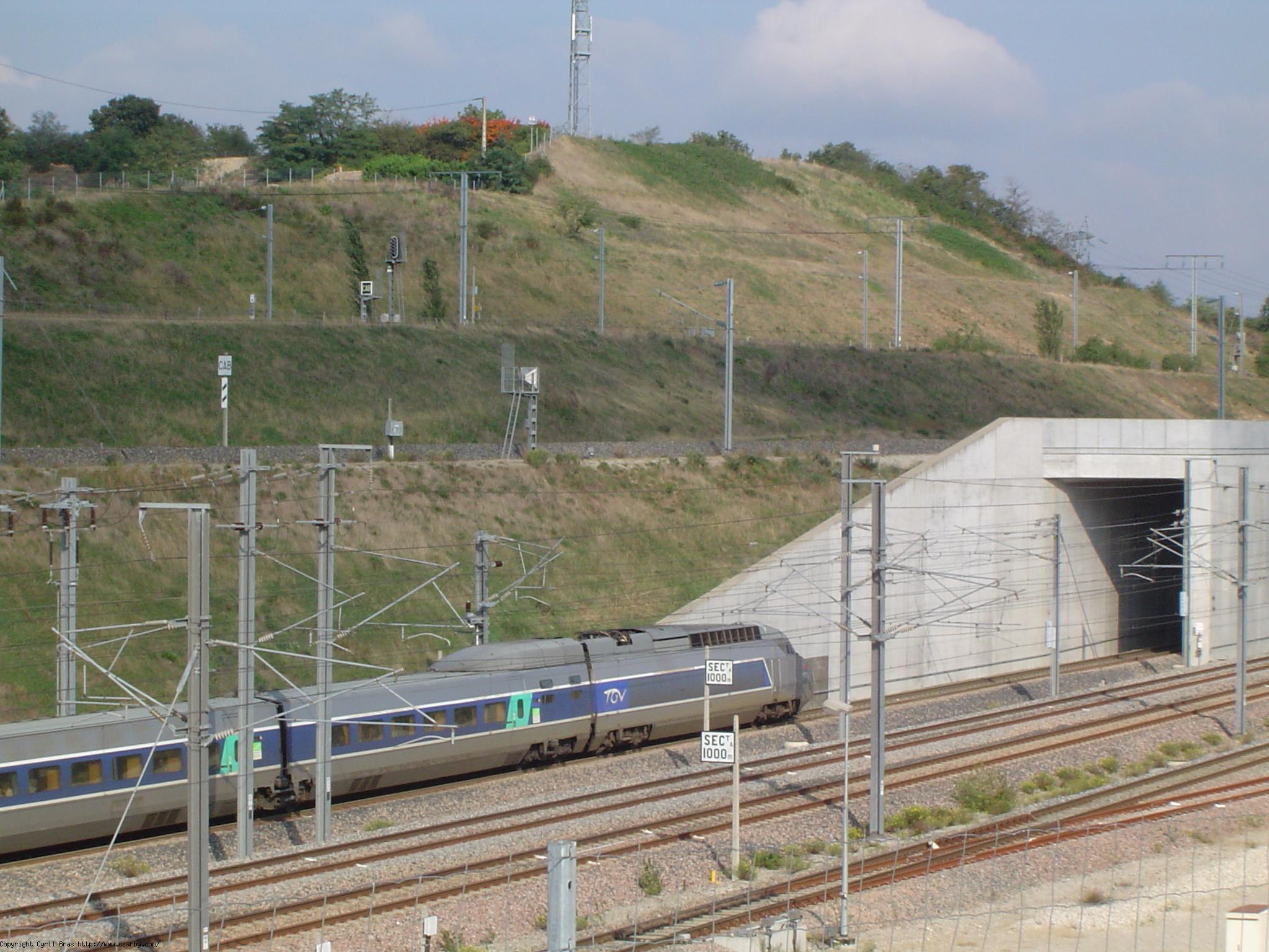 TGV Réseau sur la ligne à grande vitesse Méditerranée en gare de Valence TGV 2005. Cevenol2